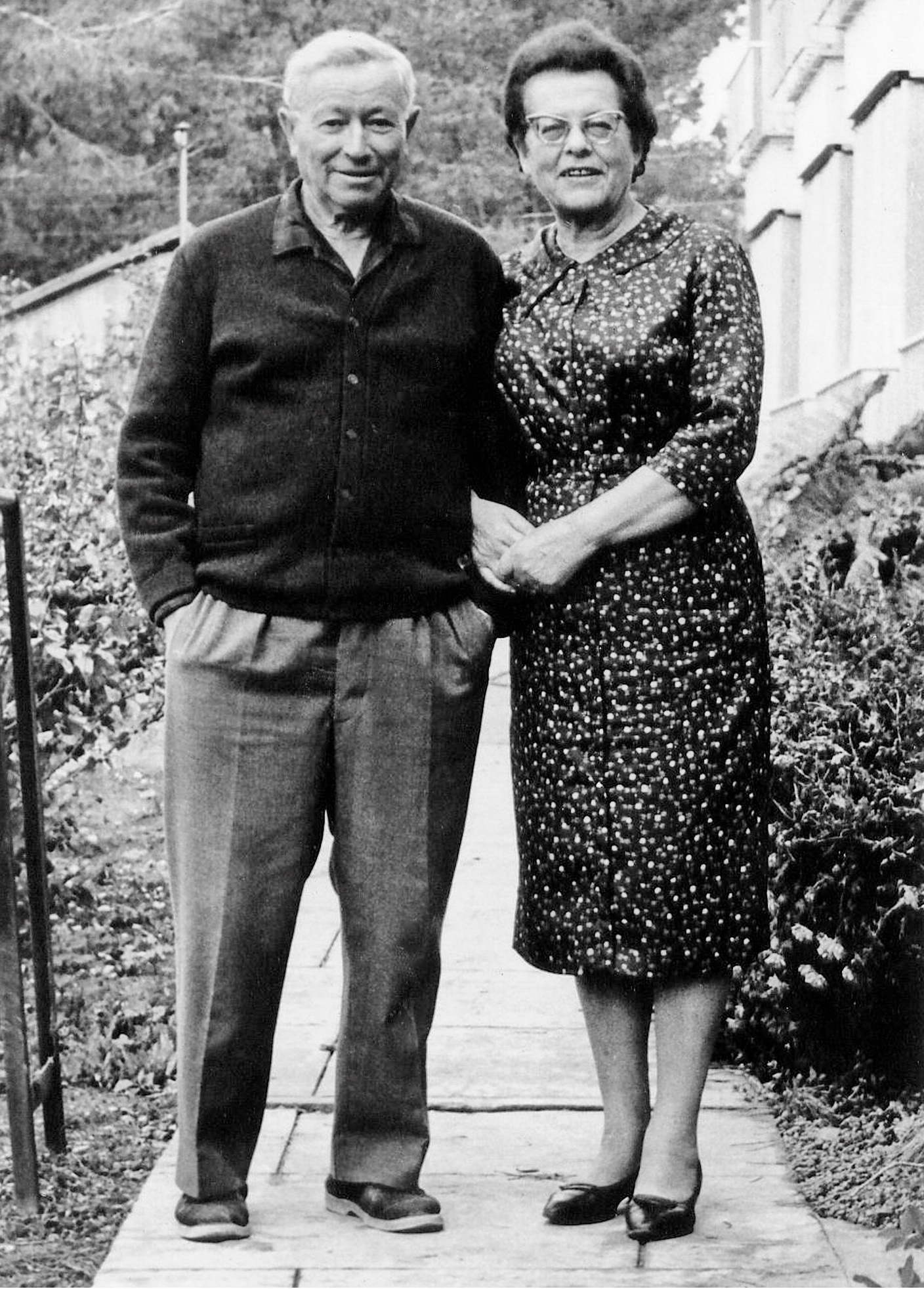 יהודית שמחוני (בת )63 ובעלה, מרדכי שמחוני (בן 70), קיבוץ גבע